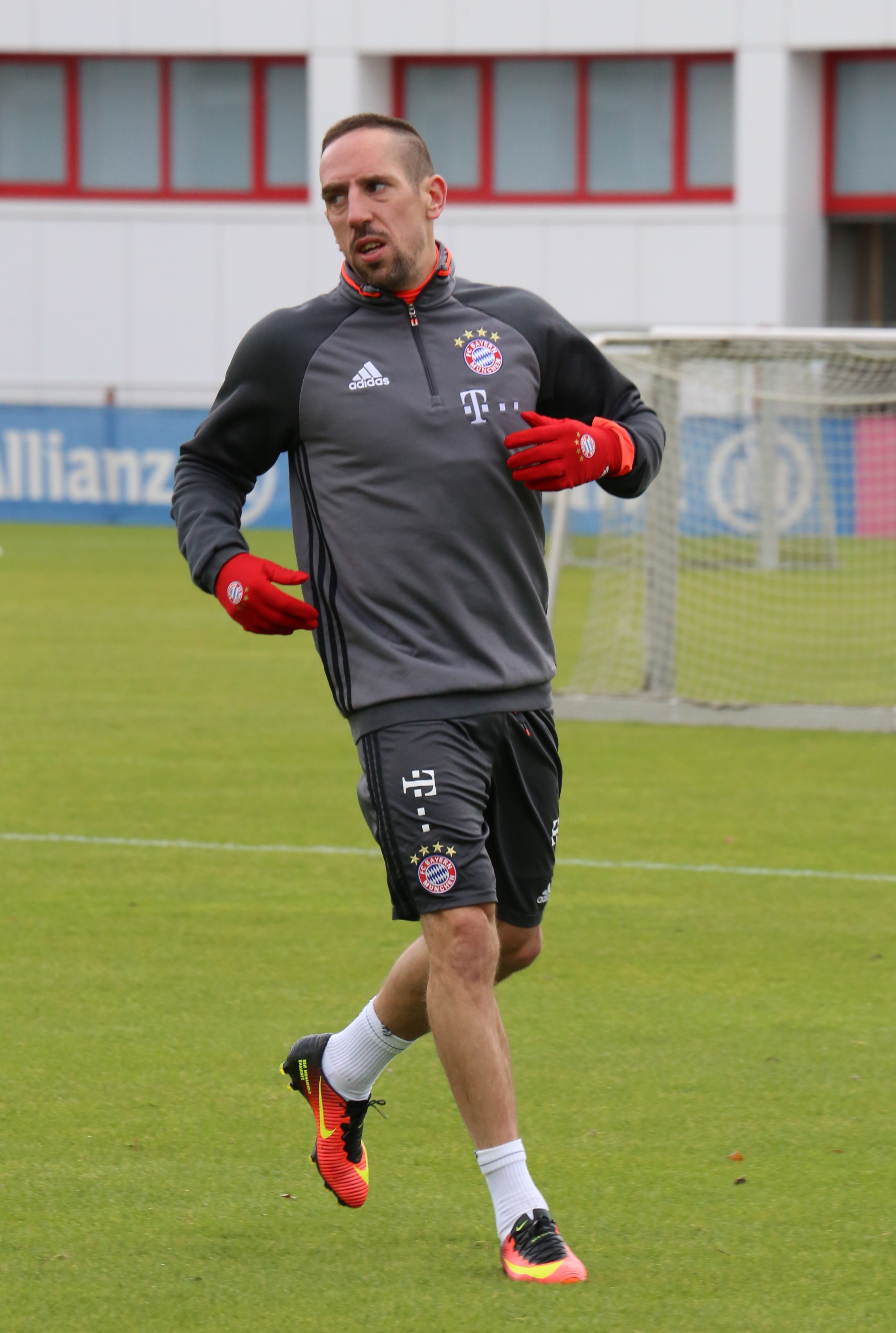 Franck Ribéry beim Training auf dem Gelände des FC Bayern München (November 2016)